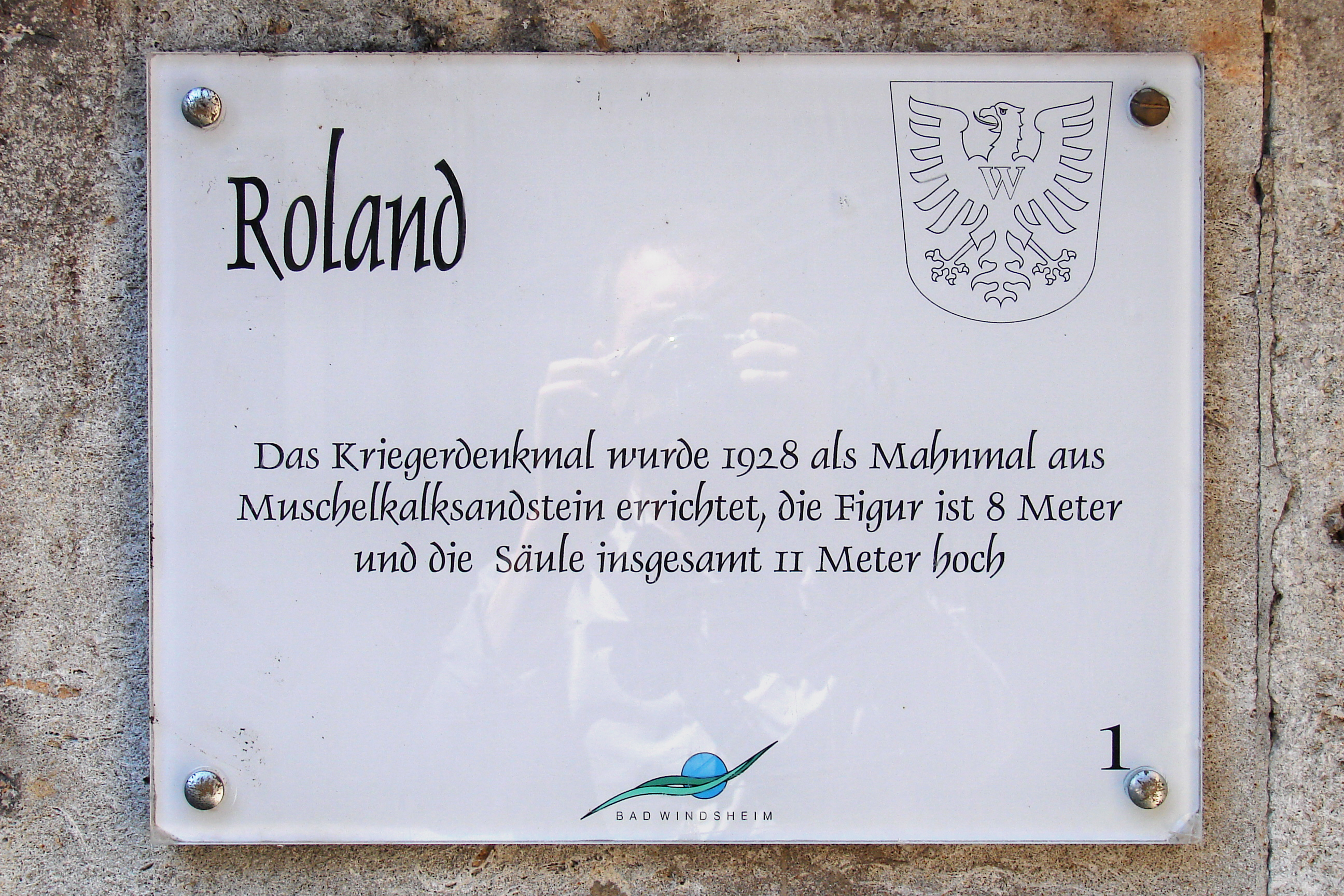 Der Bad Windsheimer Roland ist eine 1928 errichtete Statue auf dem Marktplatz bei der Kilianskirche in Bad Windsheim.